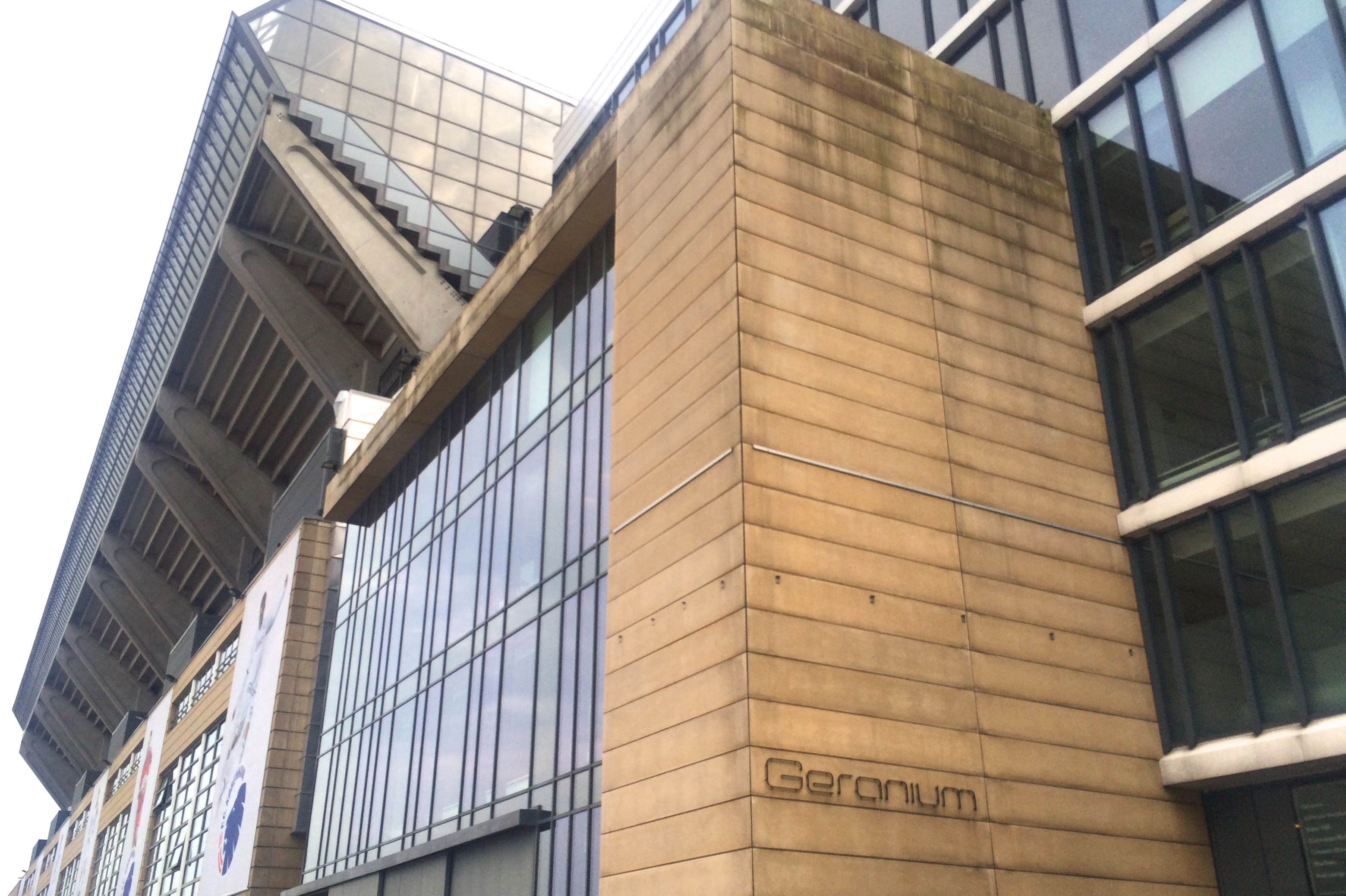 OAD Masters Dinners, Geranium, Copenhagen, Denmark 05/21/16